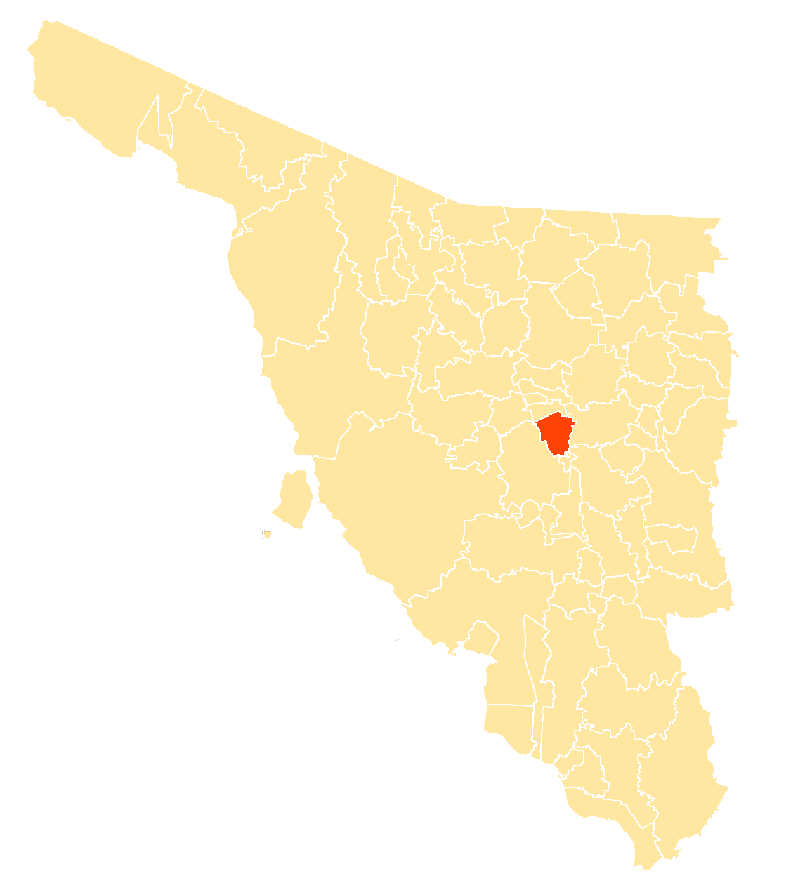 Municipio en Sonora, México.